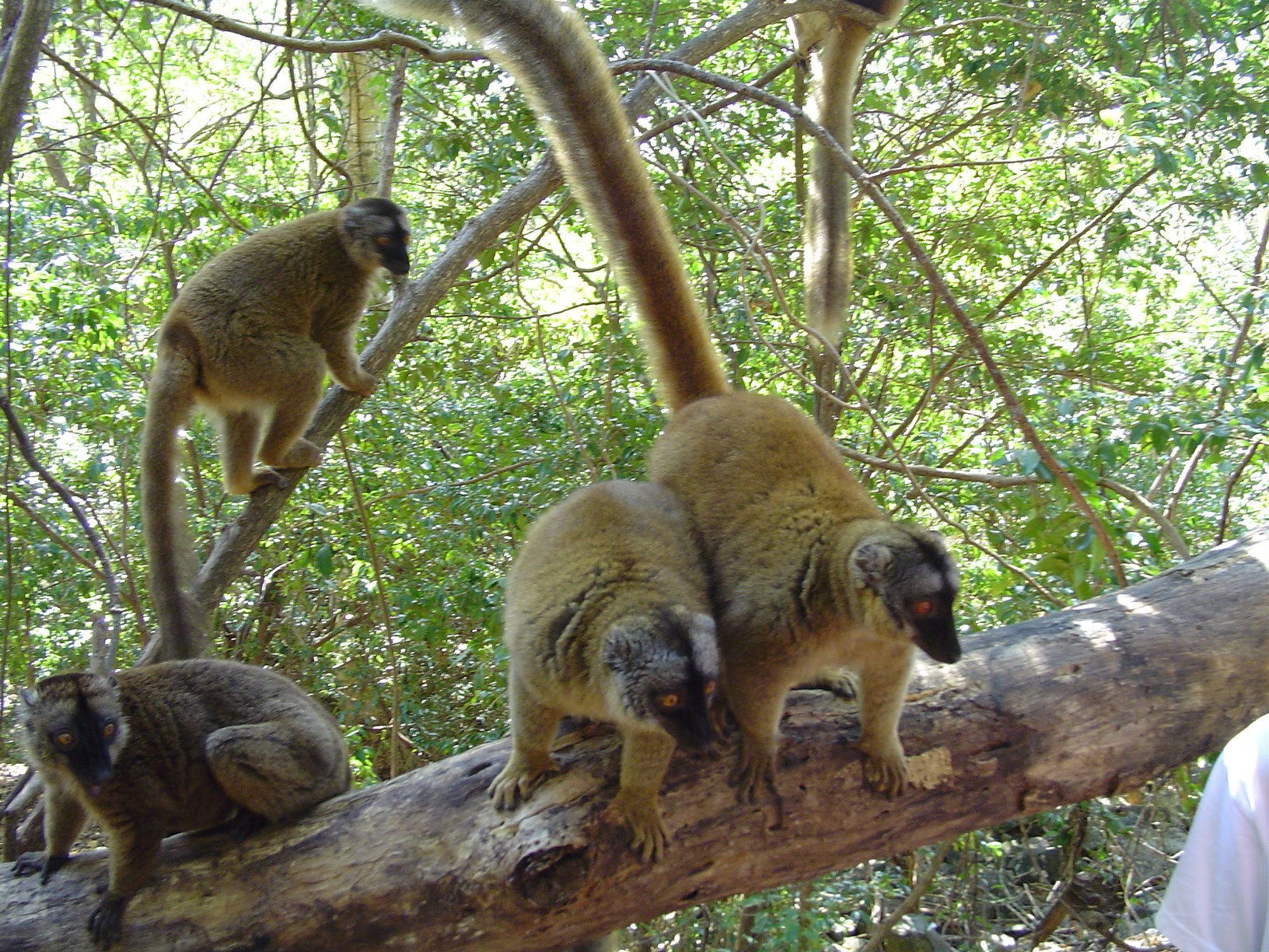 Makis